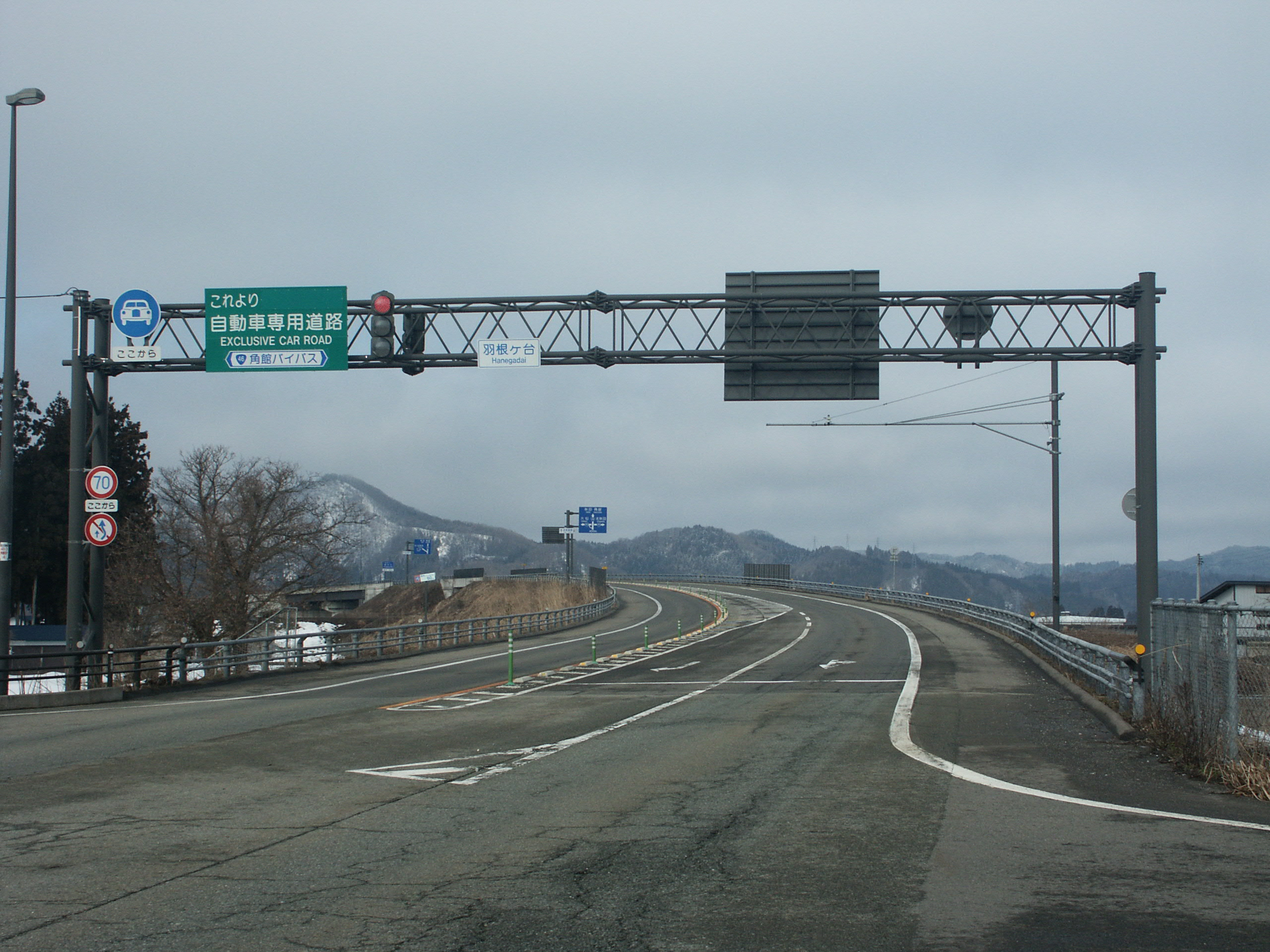 国道46号線角館バイパス秋田県仙北市羽根ヶ台交差点付近